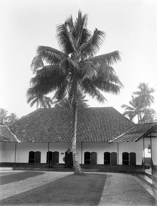 Negatief. Kokospalm met veel vruchten bij de gevangenis te Benkulen